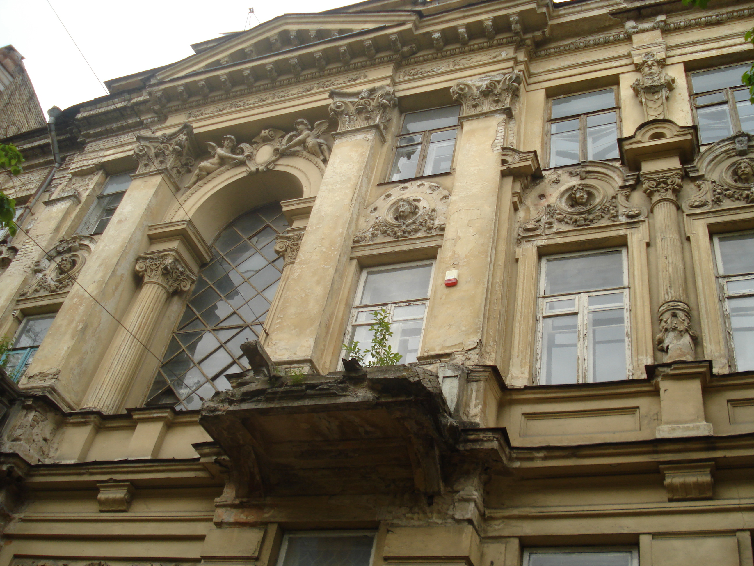 Jono Basanavičiaus gatvė 16 in Vilnius